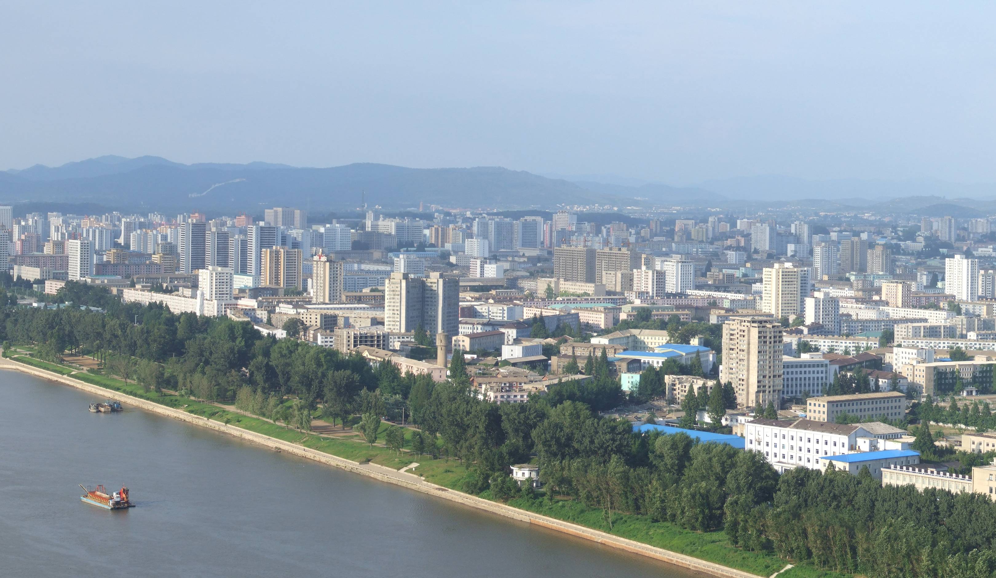 Blick auf Sŏngyo-dong in Sŏngyo-guyŏk